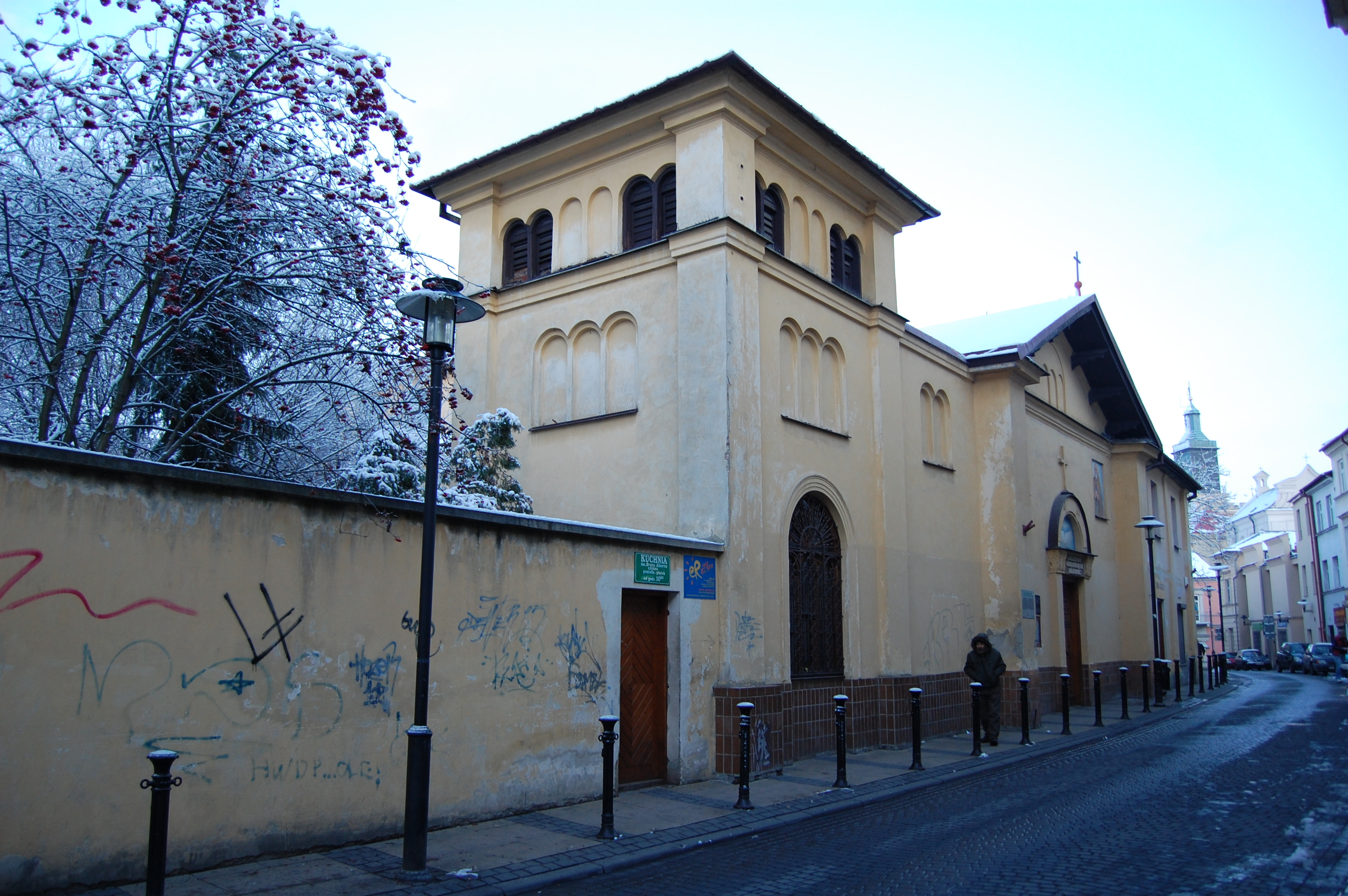 Kościół św. Józafata w Lublinie